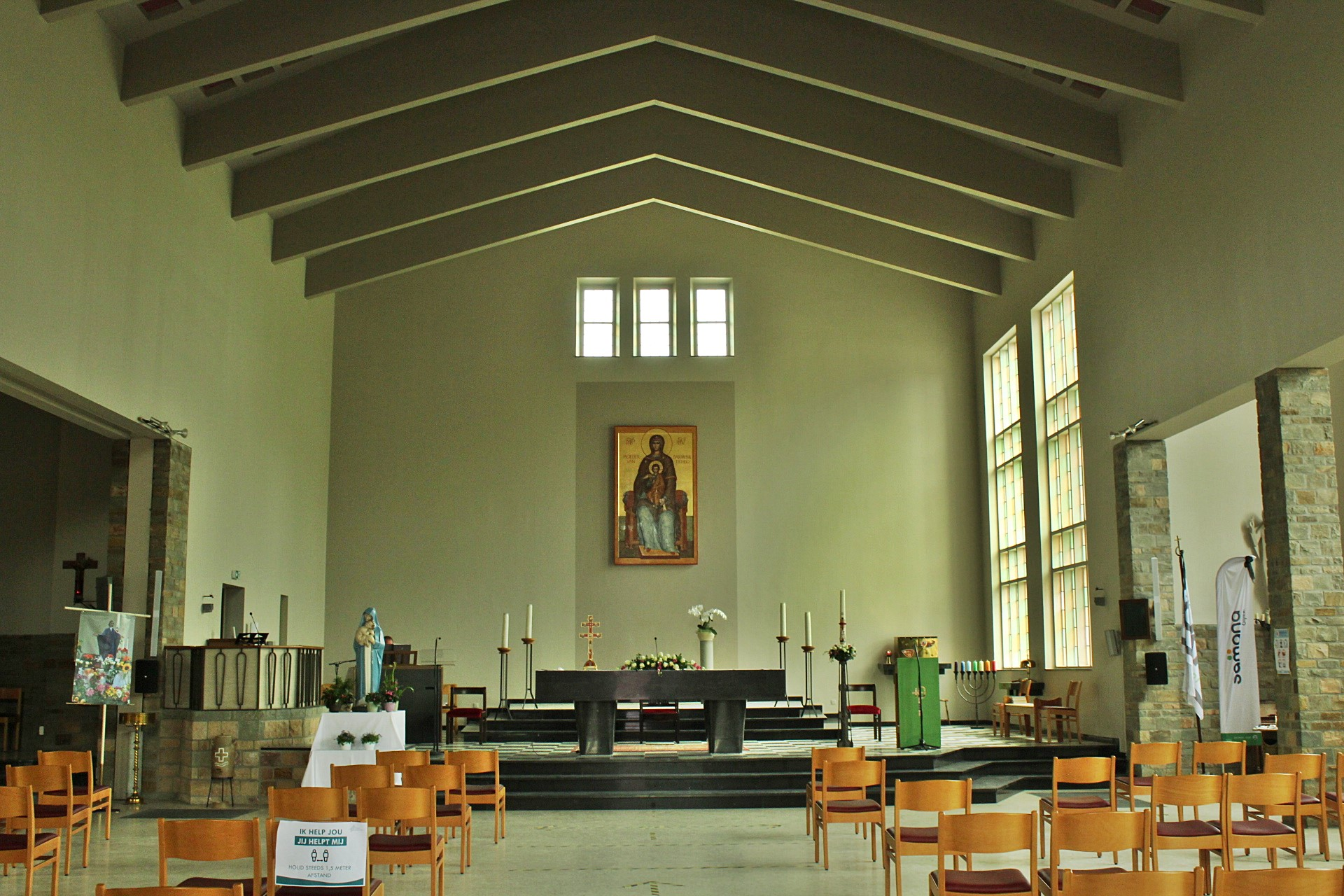 Zicht op middenbeuk en koor van de Onze-Lieve-Vrouw van Fatimakerk (Gijmel, Aarschot)